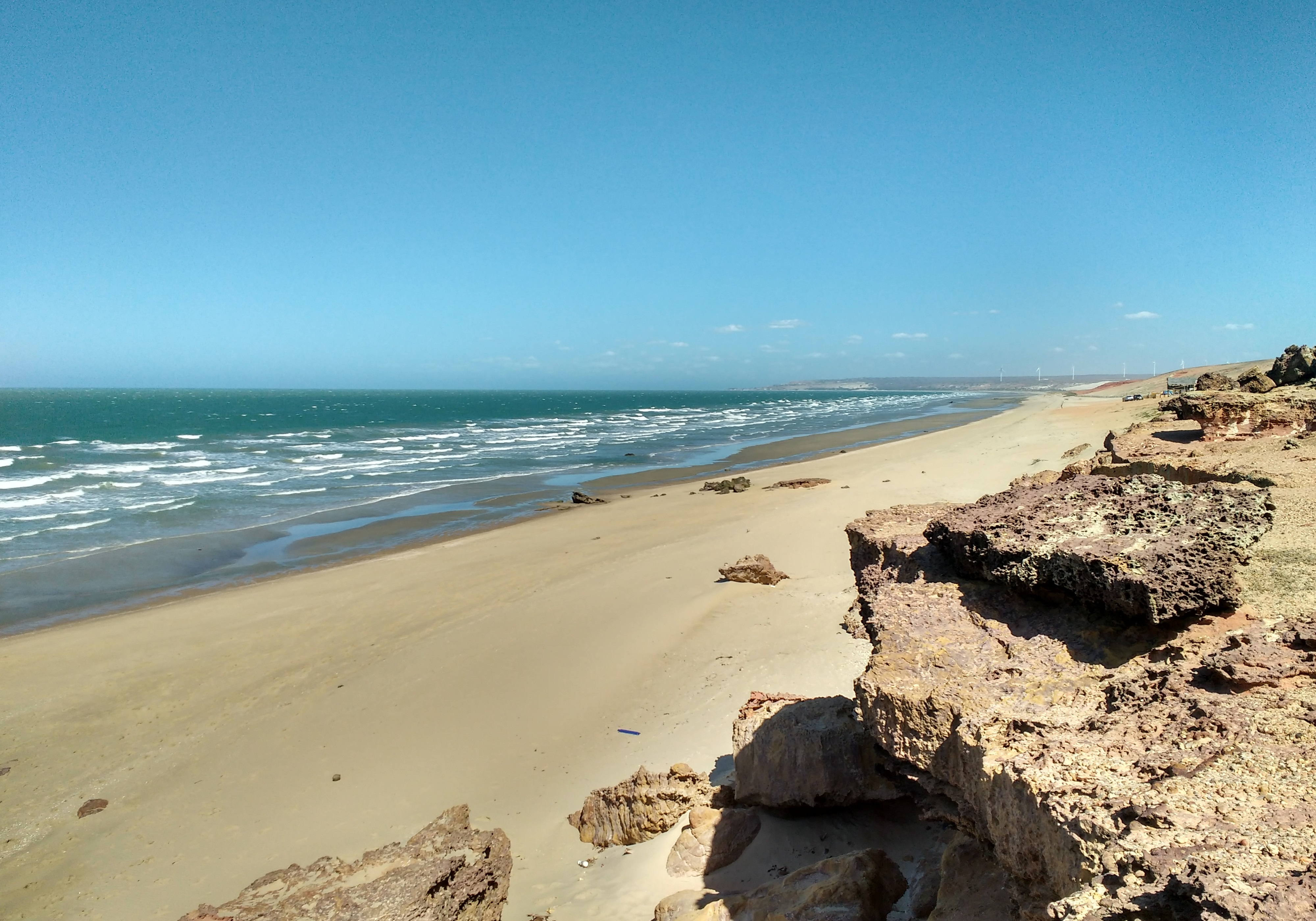 Praia de São Cristóvão em Areia Branca, Rio Grande do Norte (Brasil)